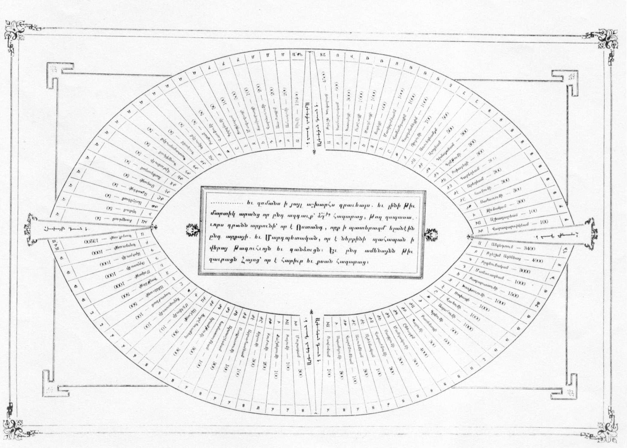 Зоранамак - государственная грамота, упорядочивающая количество и распорядок воинских сил в древнеармянском государстве